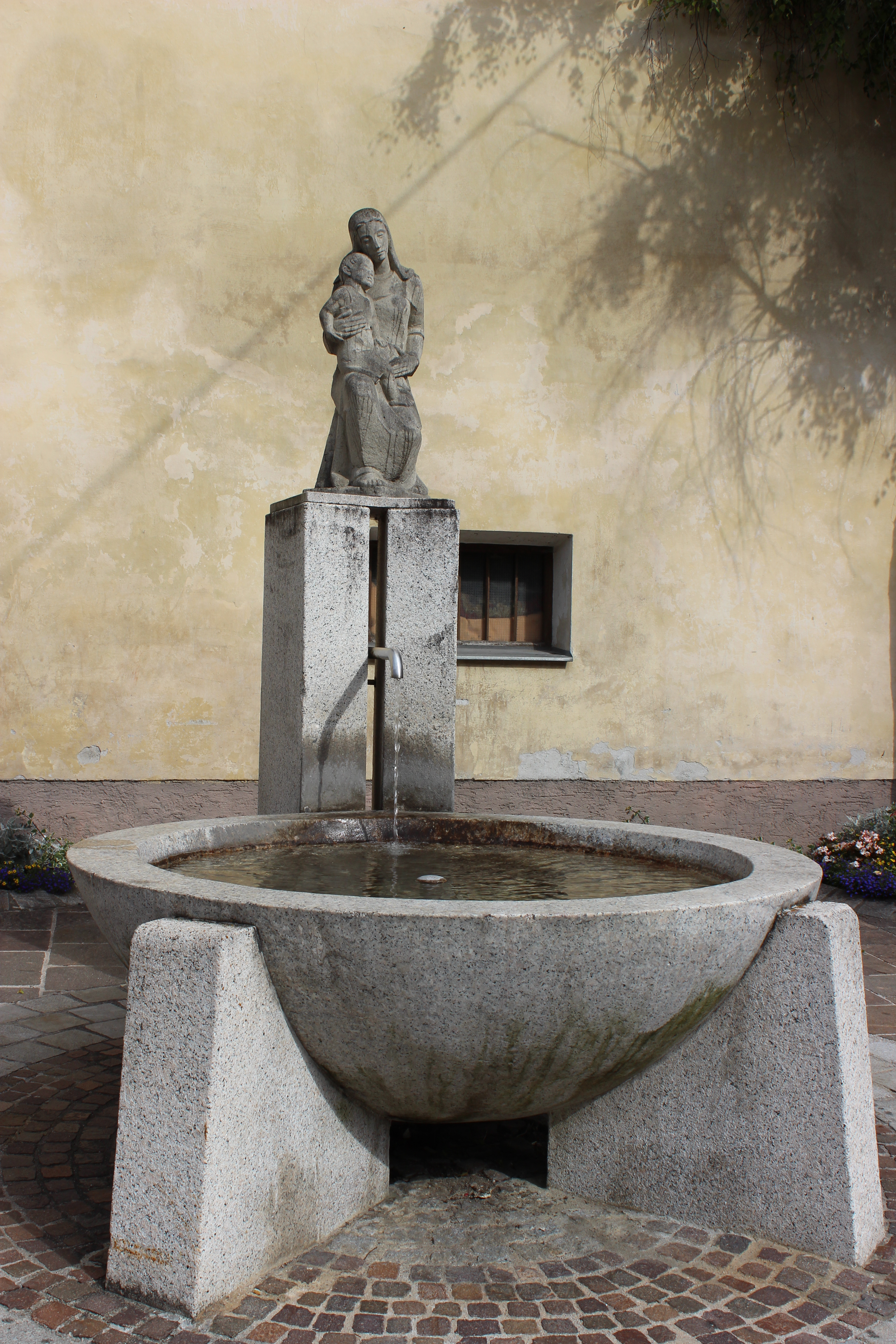 Brunnen neben der Sill in Mühlbachl bei Matrei am Brenner (Brunnen und Statue von Hans Buchgschwenter, 1963). Dahinter das alte Mesnerhaus von Pfons, 2015 für eine Friedhofserweiterung abgerissen.